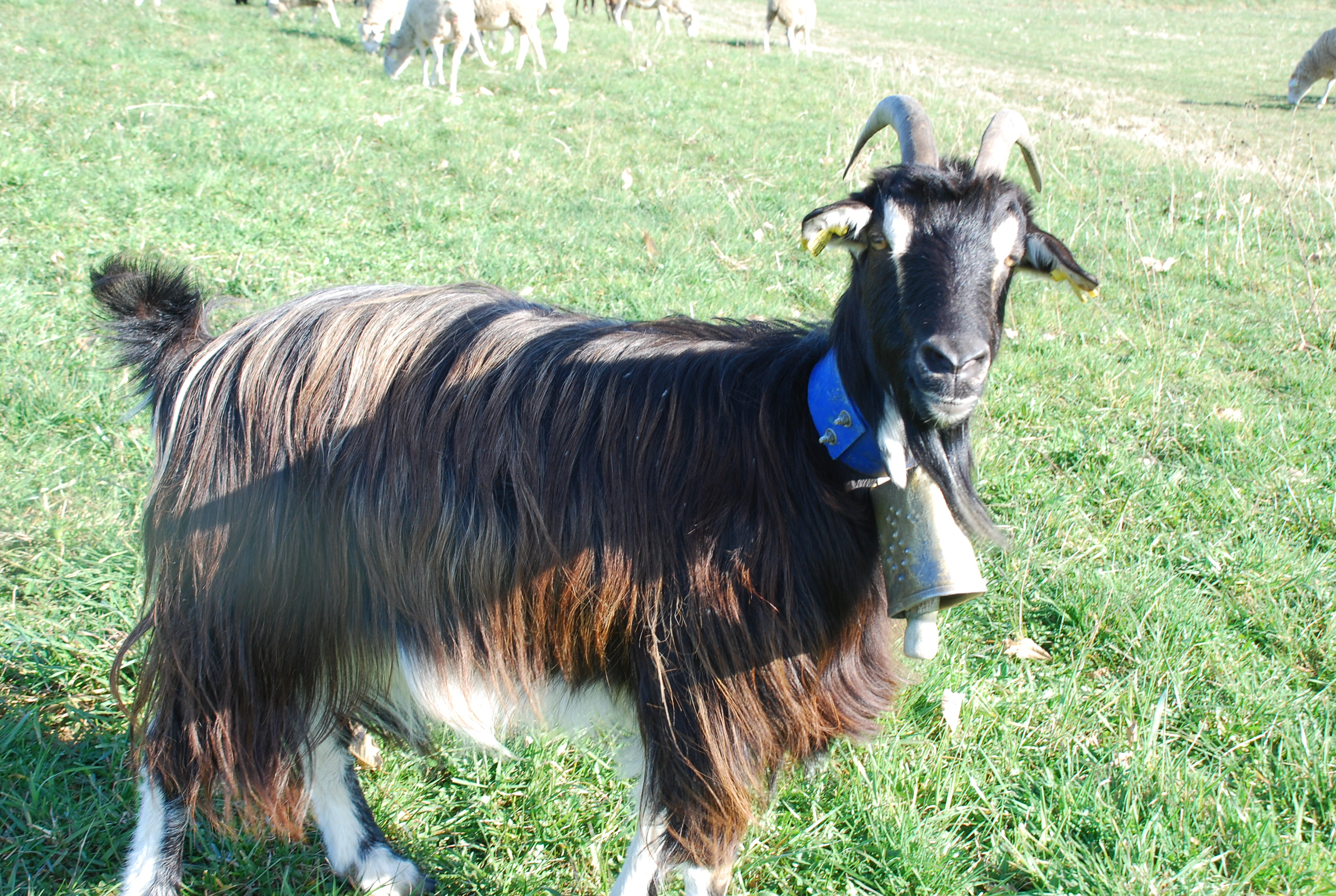 Chèvre des Pyrénées dans un troupeau de brebis de race Tarasconnaise. Photographie prise pès de Cieutat au dessus de Bagnères de Bigorre ( près de la route dite de Toulouse)